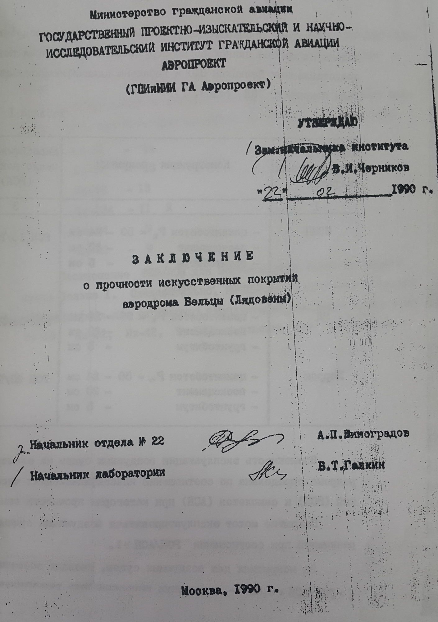 Заключение о прочности искусственных покрытий аэропорта Бельцы-Лядовены